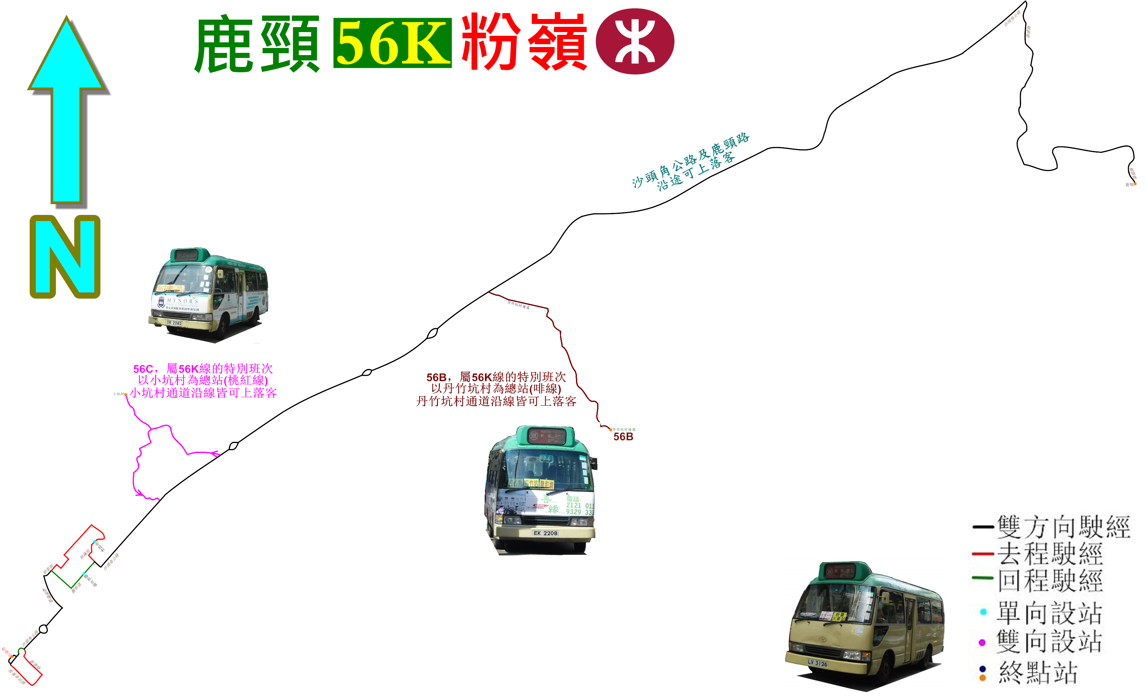 中文（香港）: 新界專線小巴56K線的走線圖